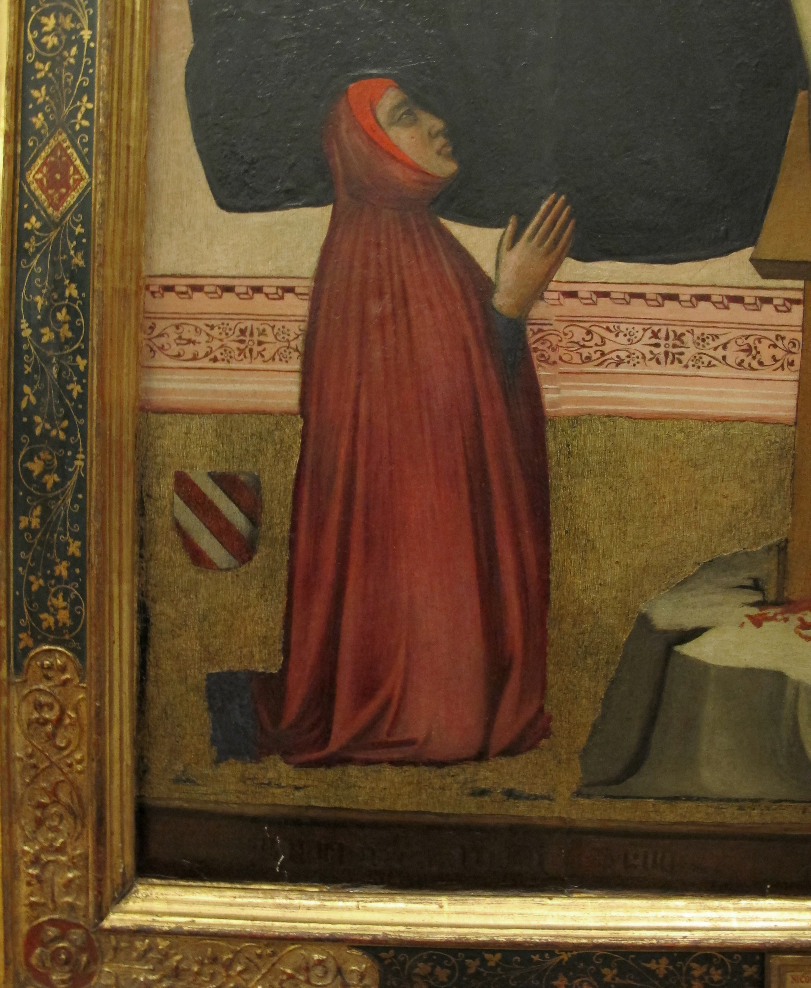 Musei Capitolini (Roma)